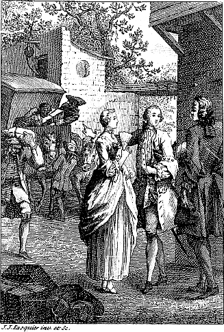 Illustration of Abbé Prévost's Histoire du Chevalier Des Grieux et de Manon Lescaut